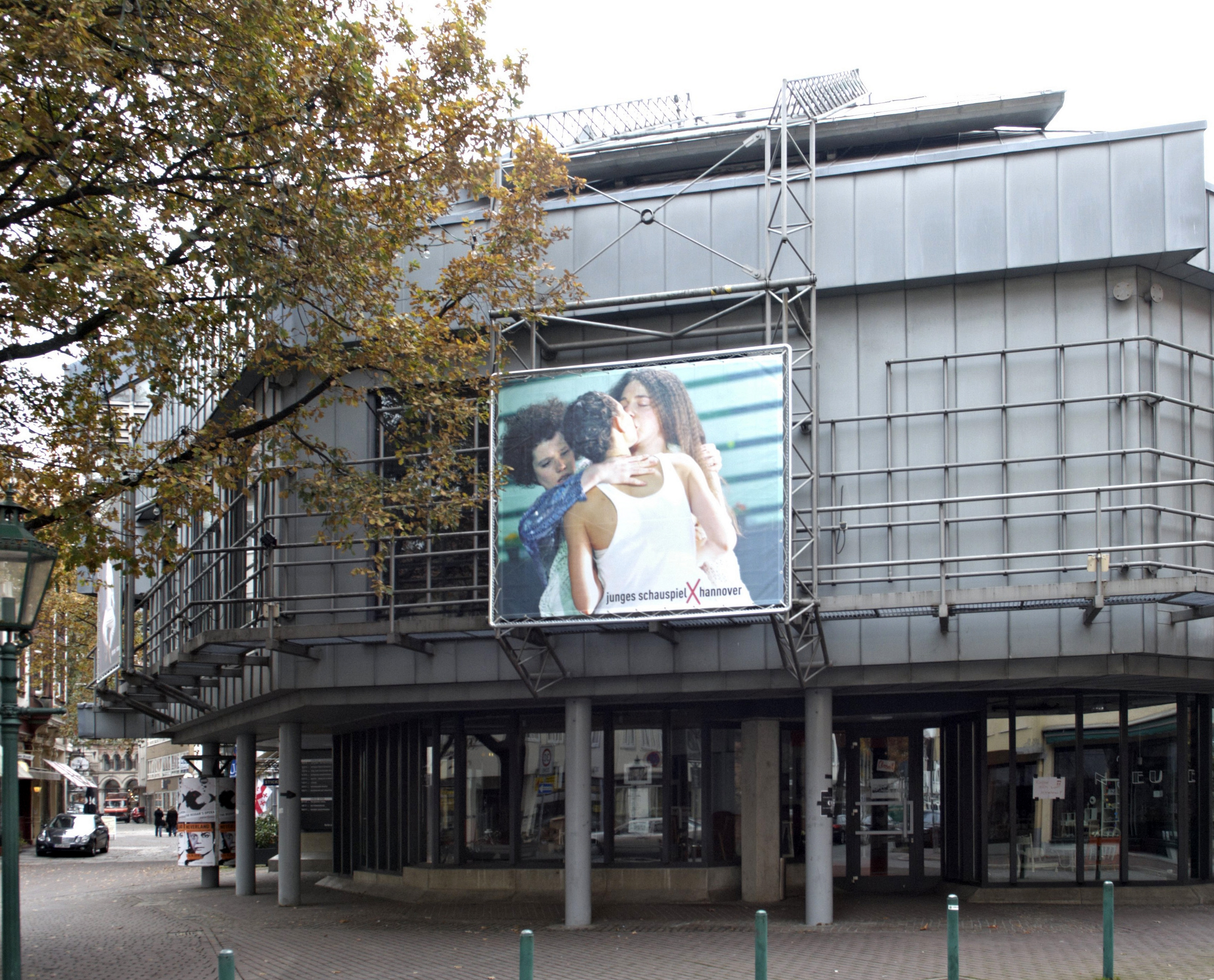 Junges Schauspiel